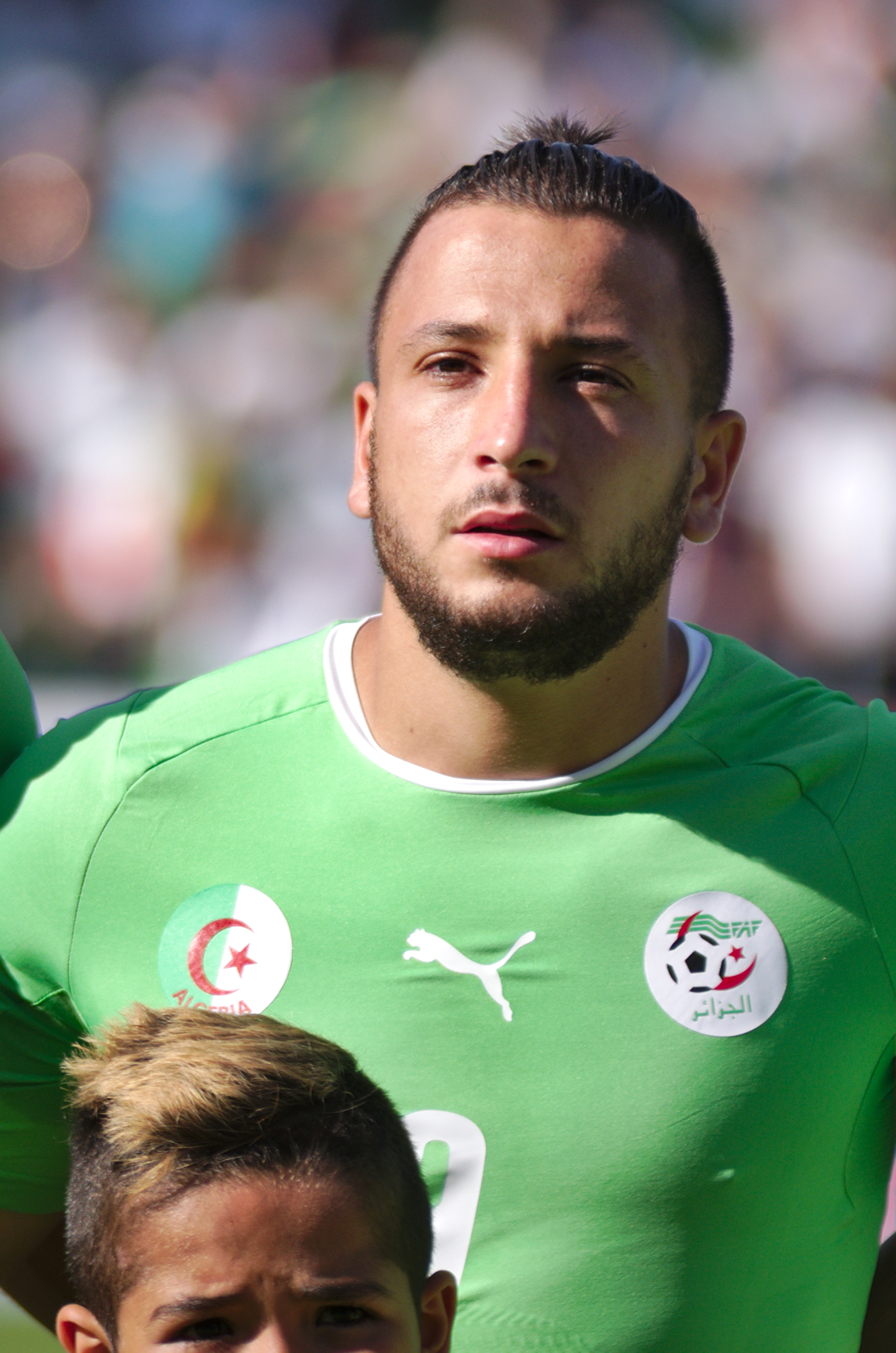 Algérie - Arménie - 20140531 - Nabil Ghilas